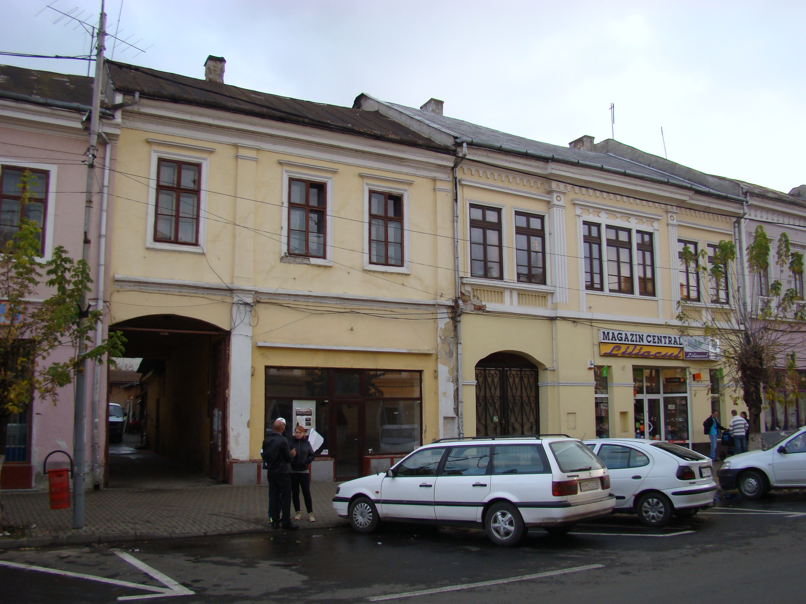 Casă, municipiul Sighetu Marmației, Str. Mihaly Ioan de Apșa 13